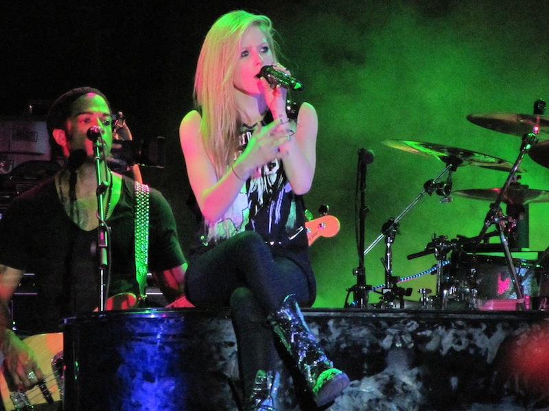 Avril in Belo Horizonte